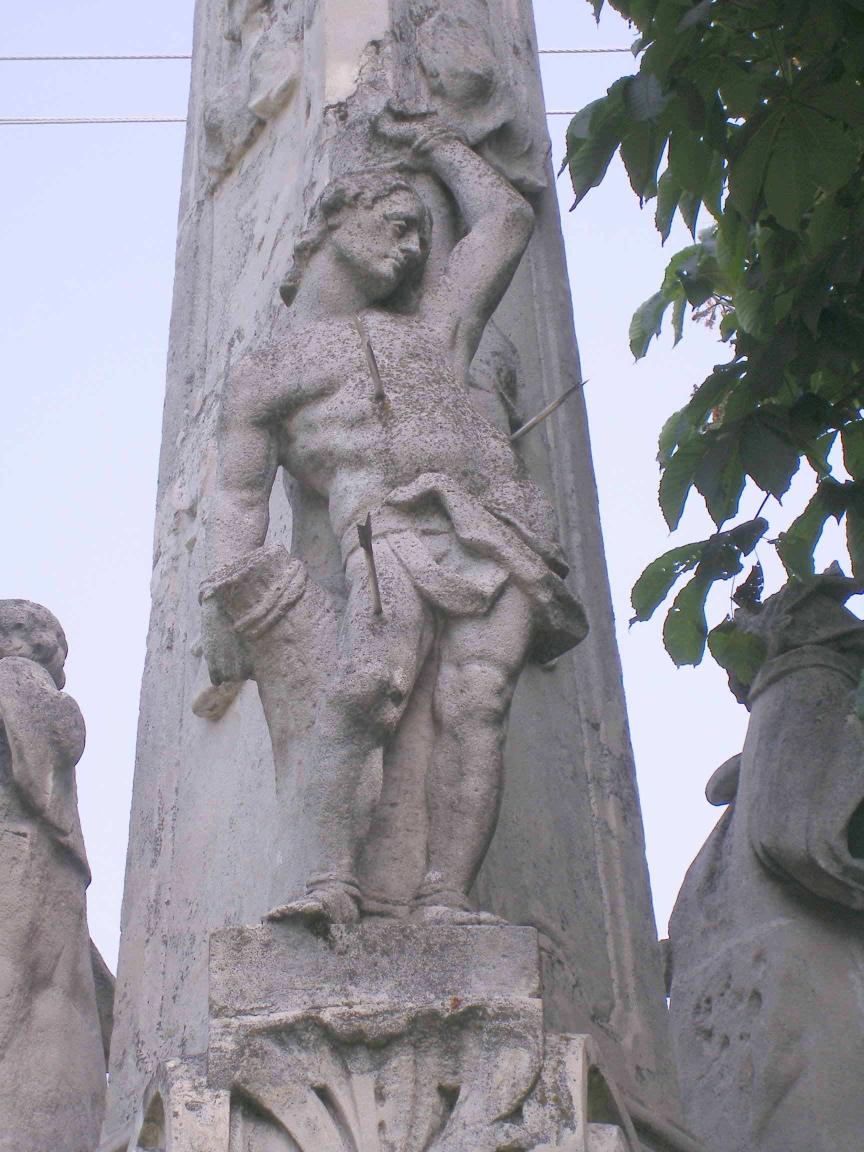 Bagota - Szentháromság-szobor (részlet)